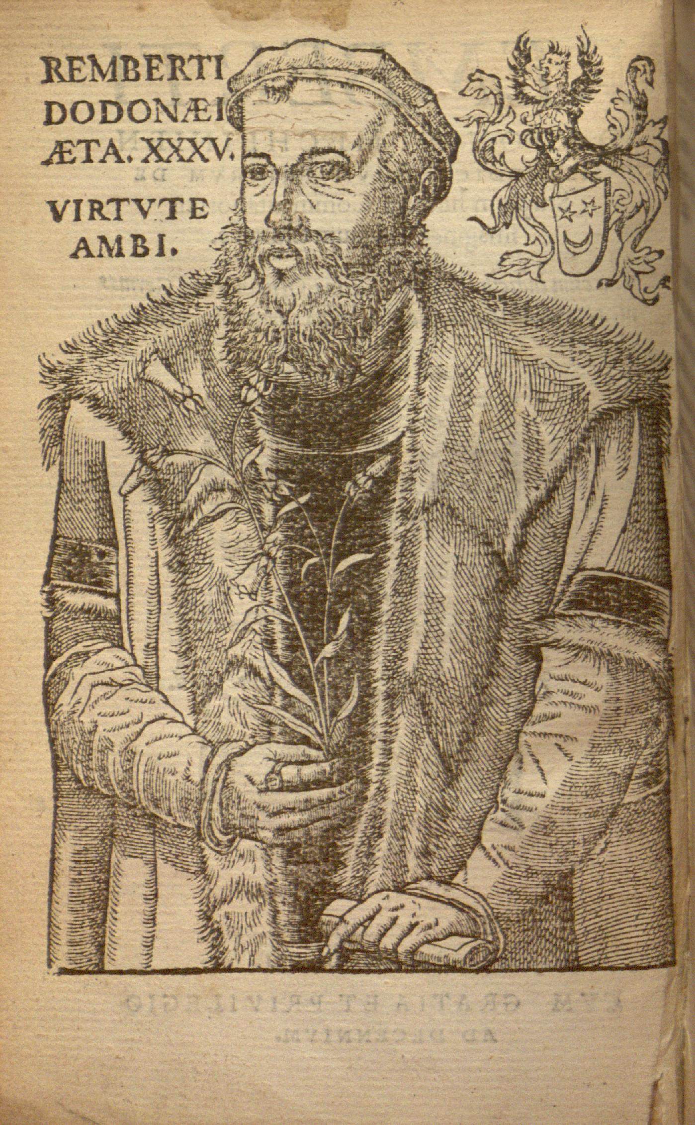 Remberti Dodonaei ... trium priorum de stirpium historia commentariorum imagines ad viuum expressae :una cum indicibus, graeca, latina, officinarum, germanica, brabantica, gallicaq[ue] nomina complectentibus.